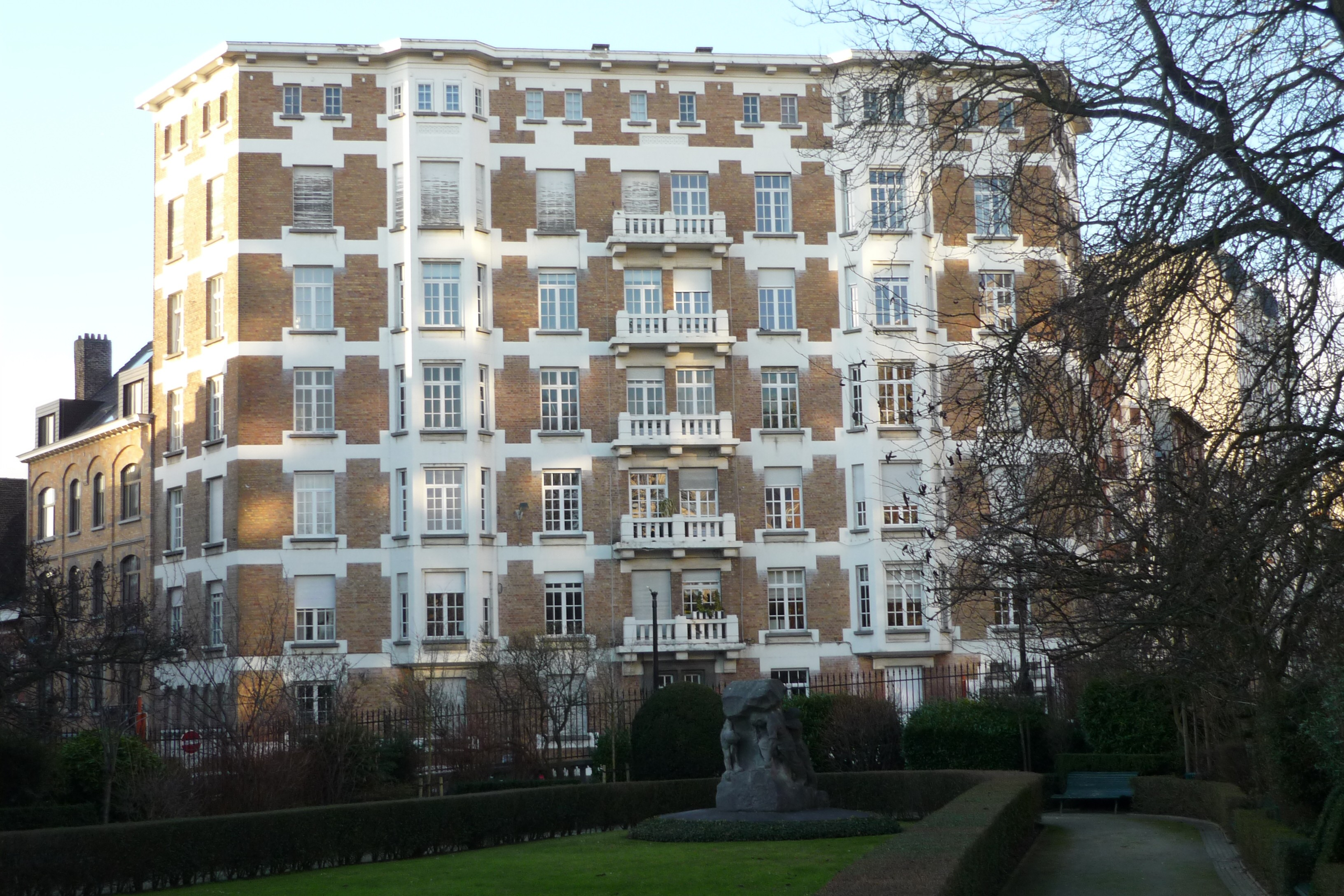 Immeuble Art Déco situé à Saint-Josse-ten-Noode (Bruxelles) au Square Armand Steurs, 21.